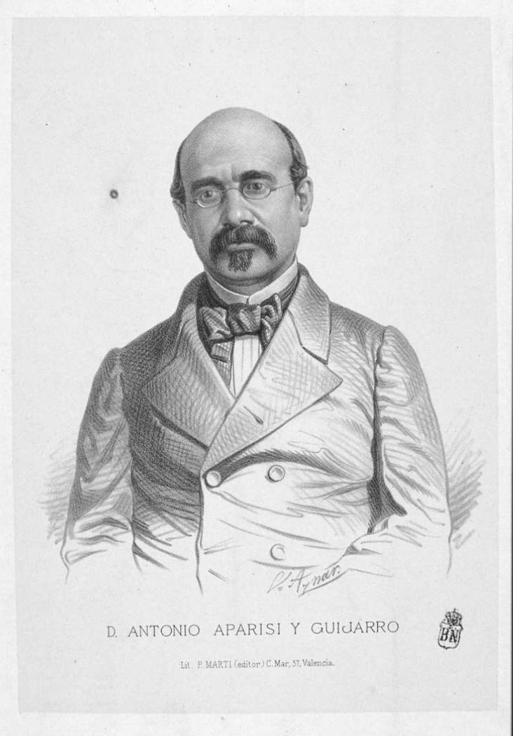 Retrato de Antonio Aparisi y Guijarro.